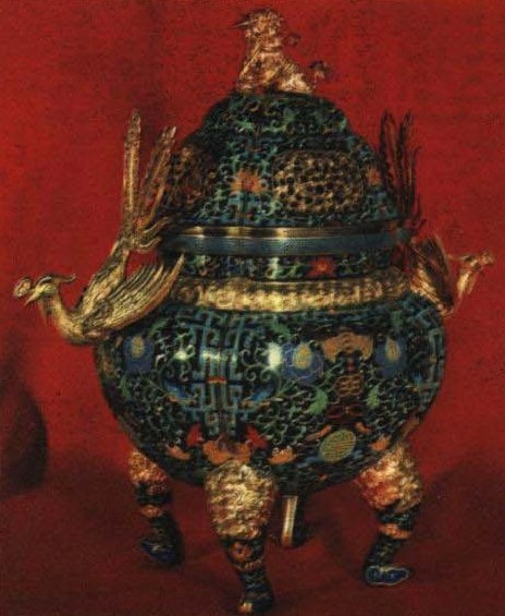 1963-03 1963年 景泰蓝香炉